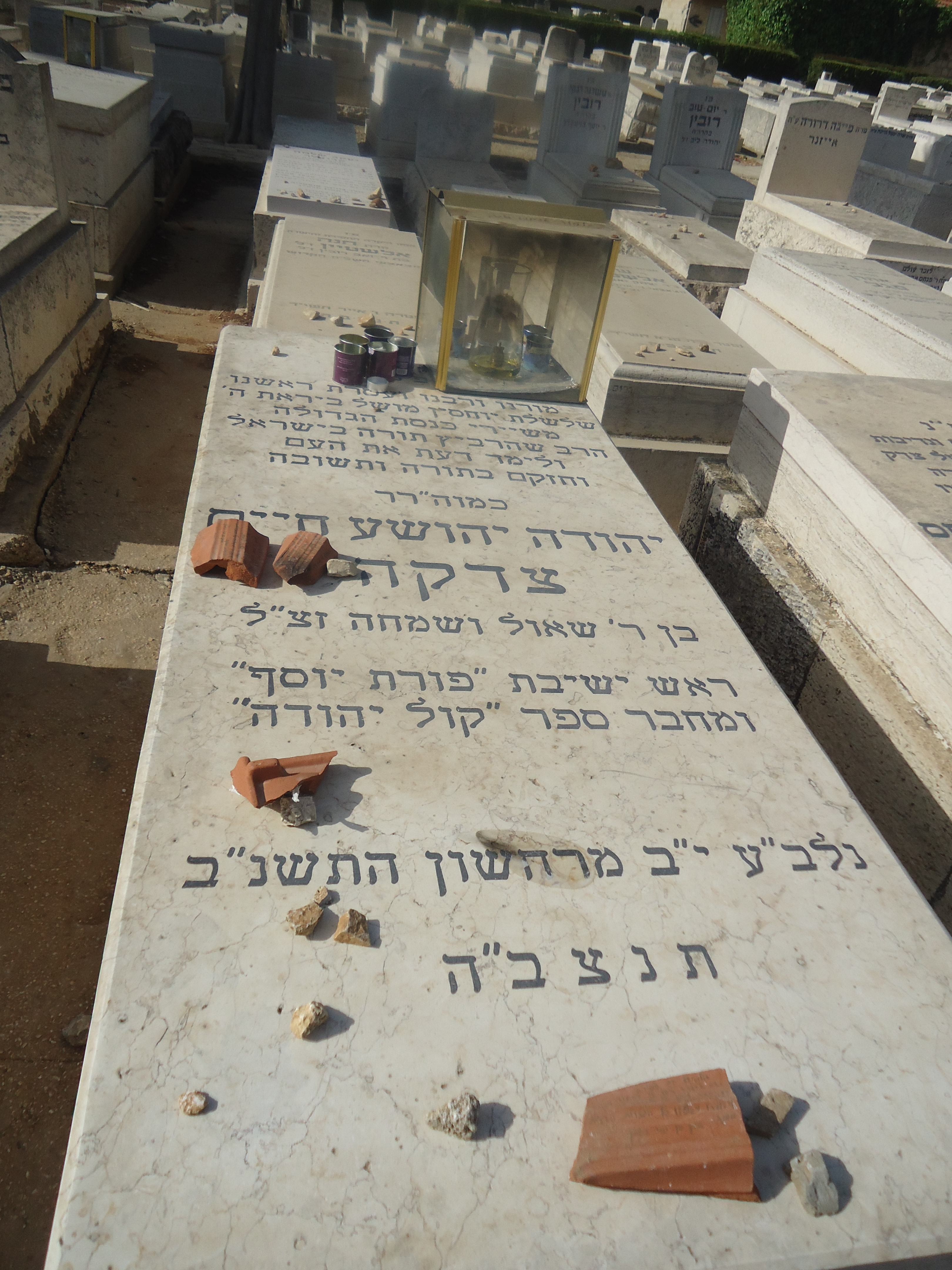 מצבת קברו של הרב יהודה צדקה ז"ל בבית הקברות סנהדריה בירושלים